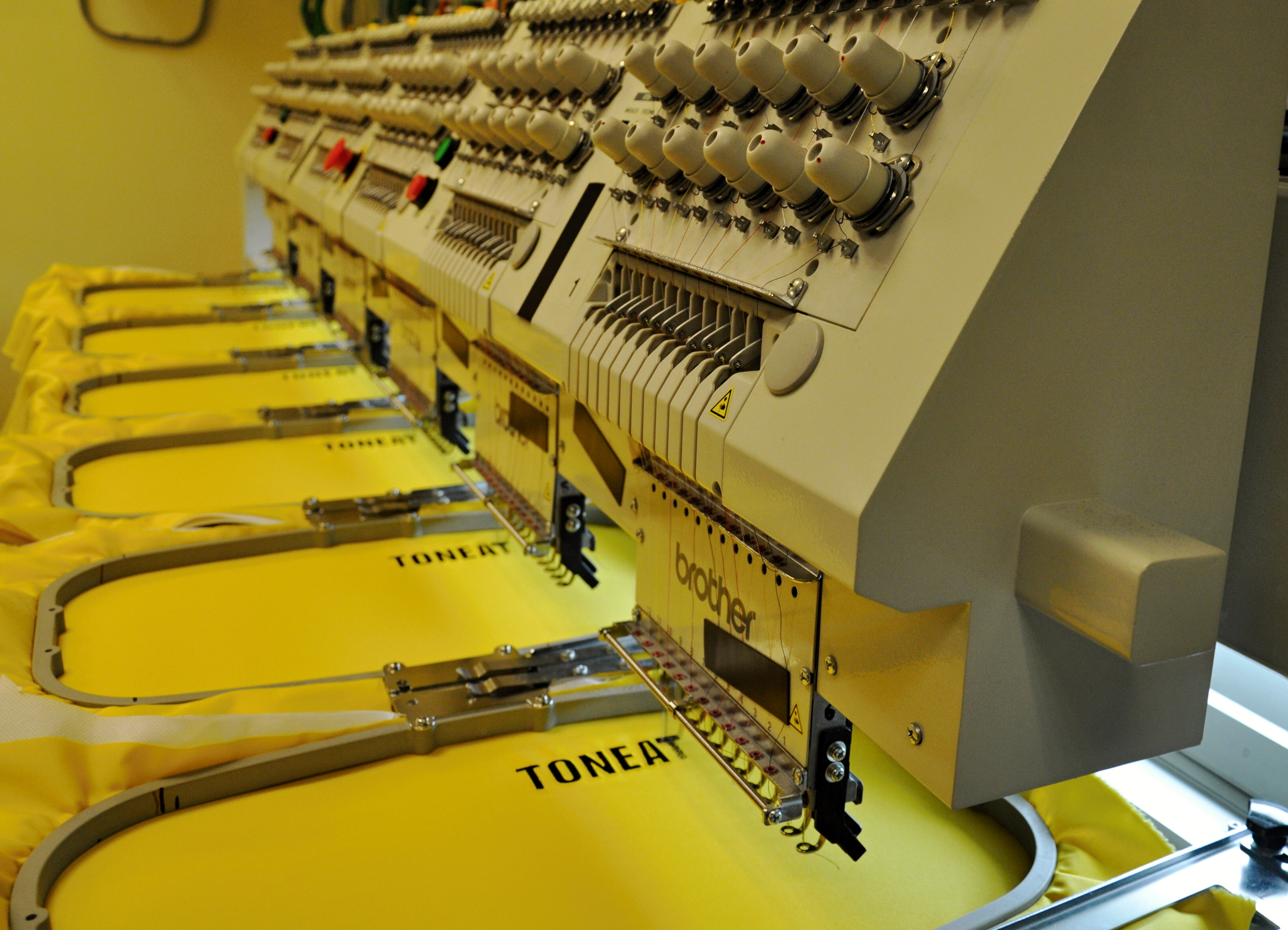 Moderní, vícejehlový vyšívací automat